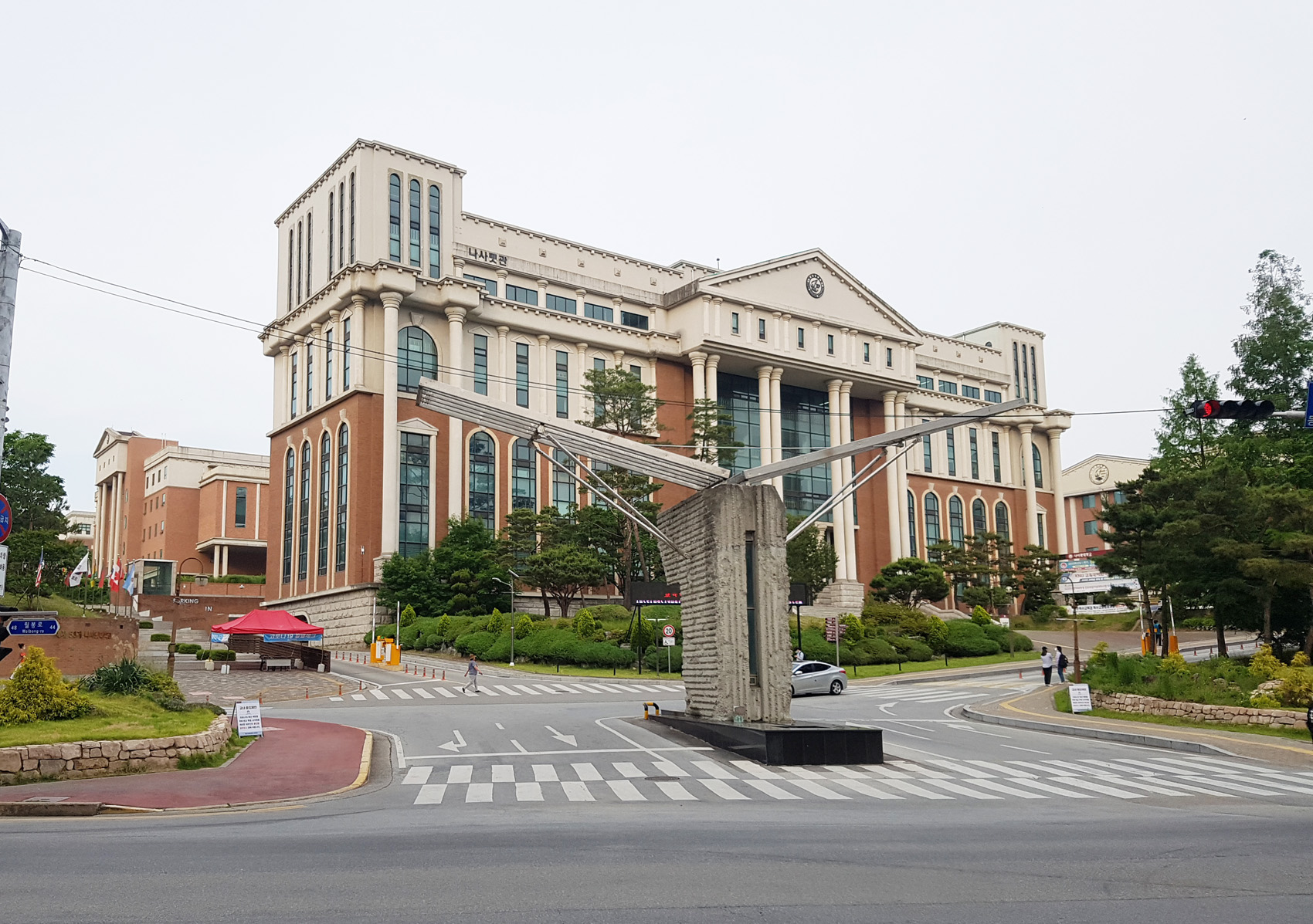 나자렛대학교 정문